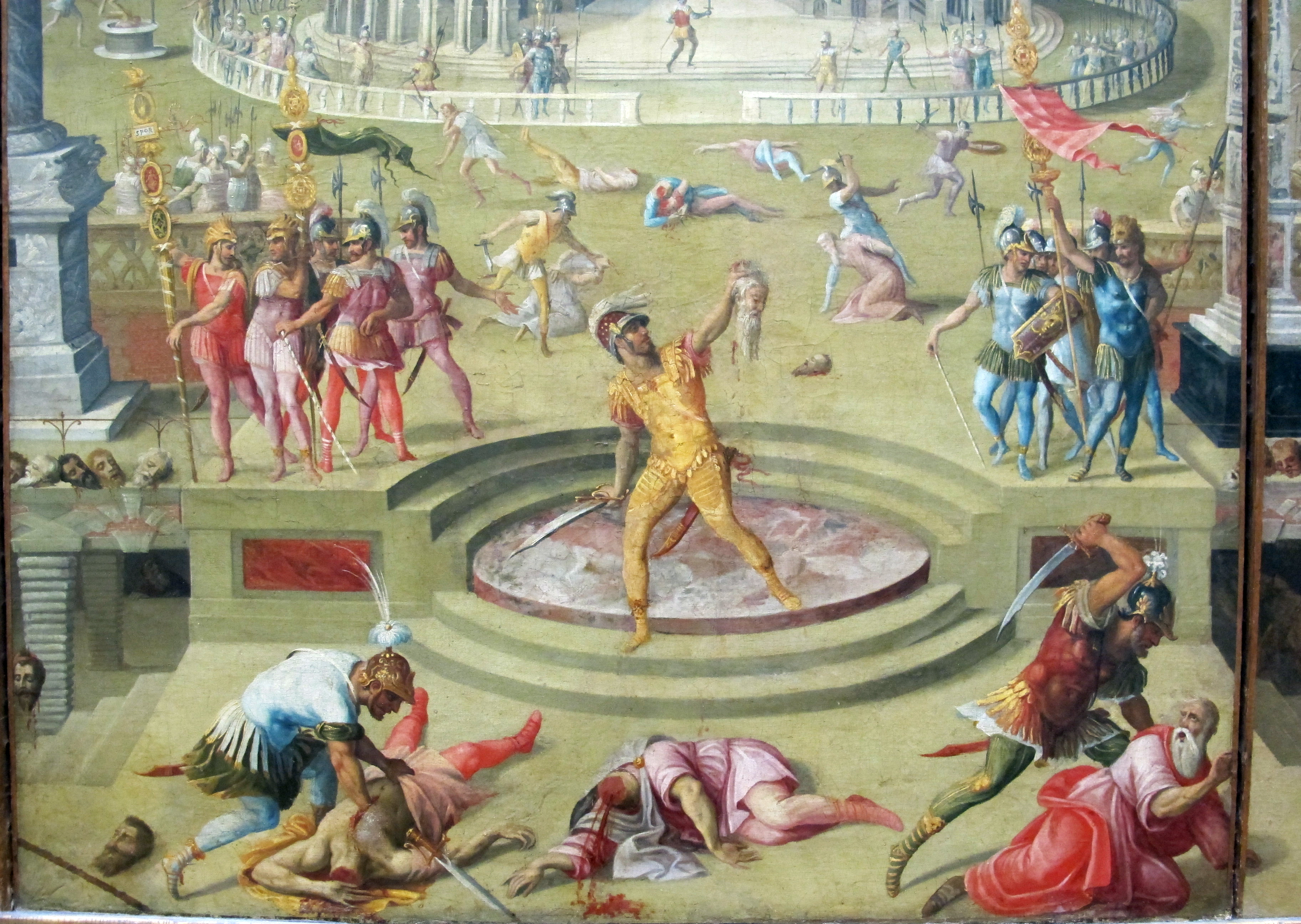 Pittura francese del XVI secolo, Louvre, Parigi